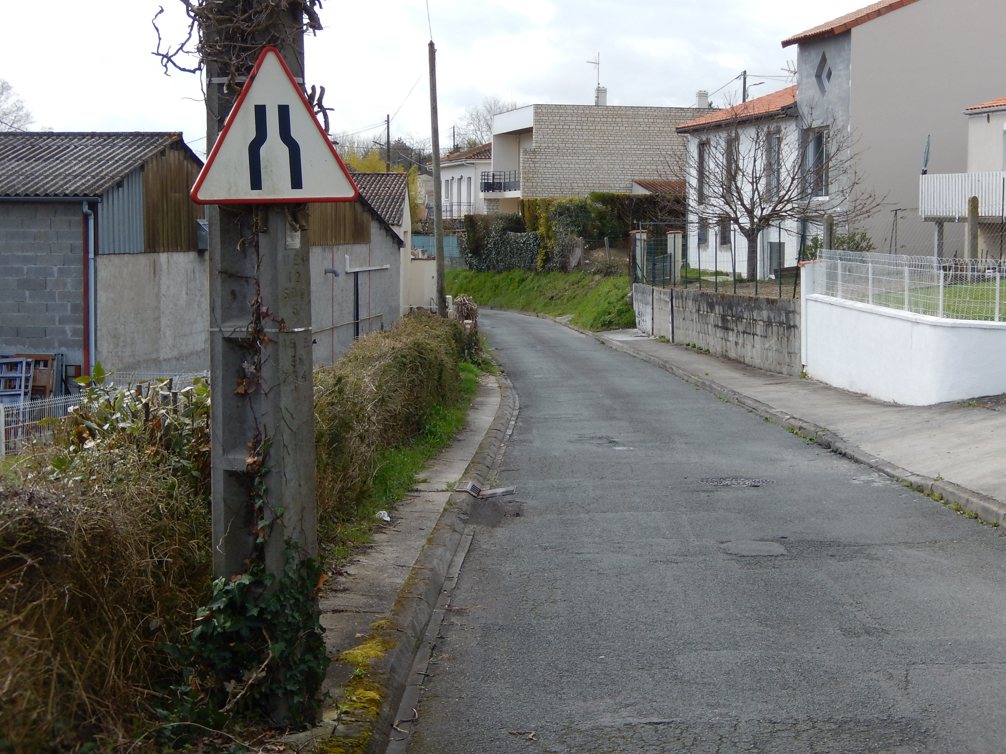 Un panneau de signalisation de type A3, datant de 1966, positionné sur le chemin des Blanchardes, à Saintes (Charente-Maritime).